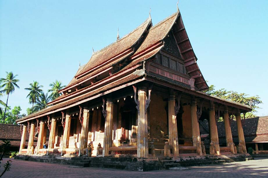 Wat Sisaket Vientiane